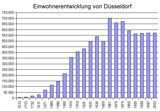 Einwohnerentwicklung von Düsseldorf 1632–2003